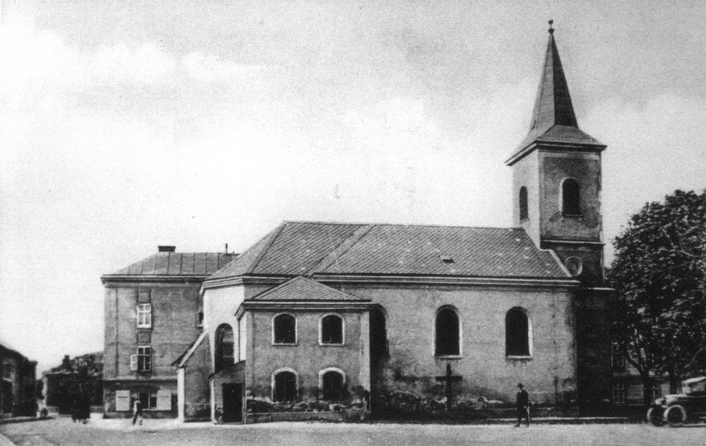 Servatiuskirche in Wien Liesing um 1933